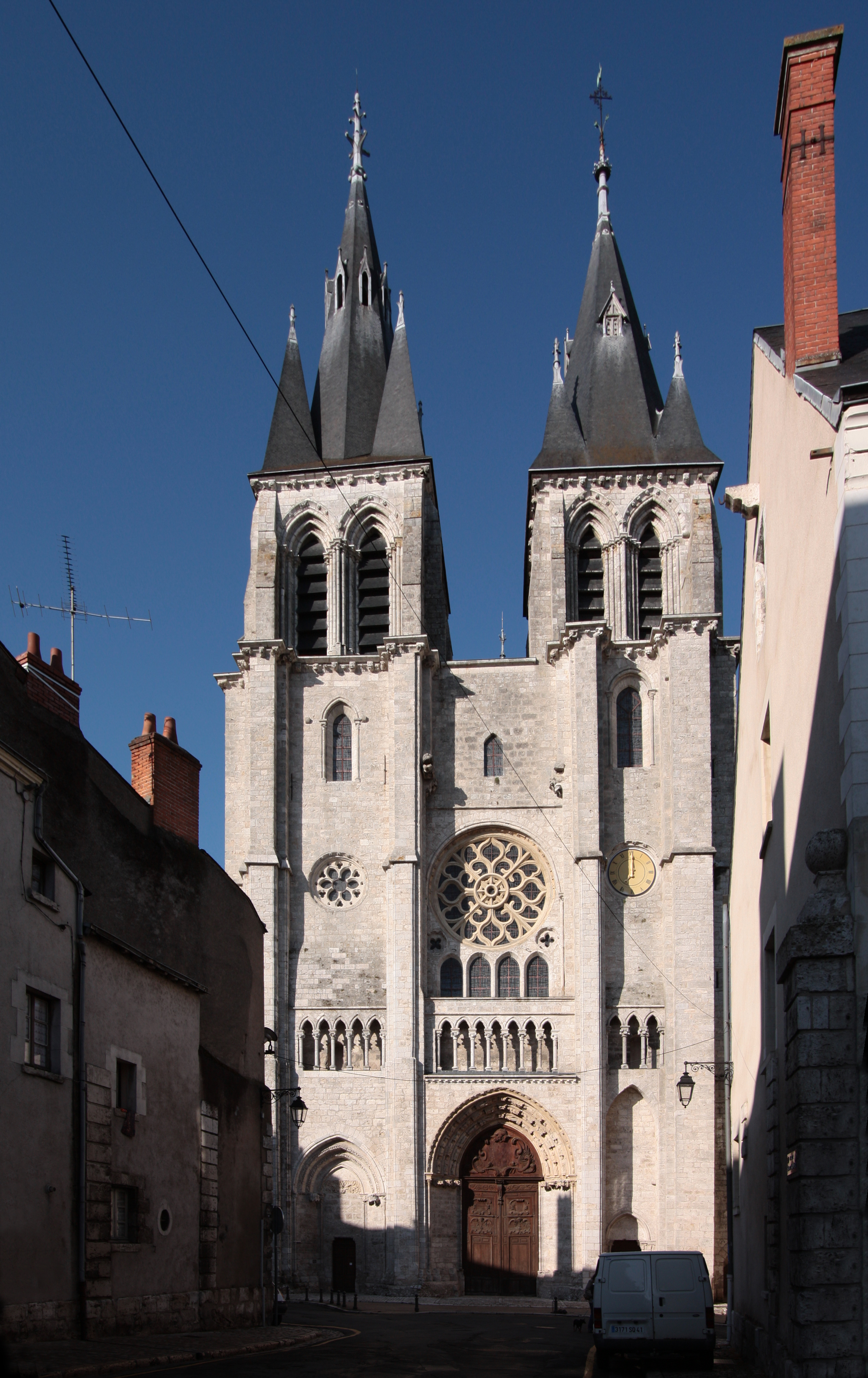 Kirche Saint-Nicolas in Blois, Departement Loir-et-Cher/Frankreich - Westseite